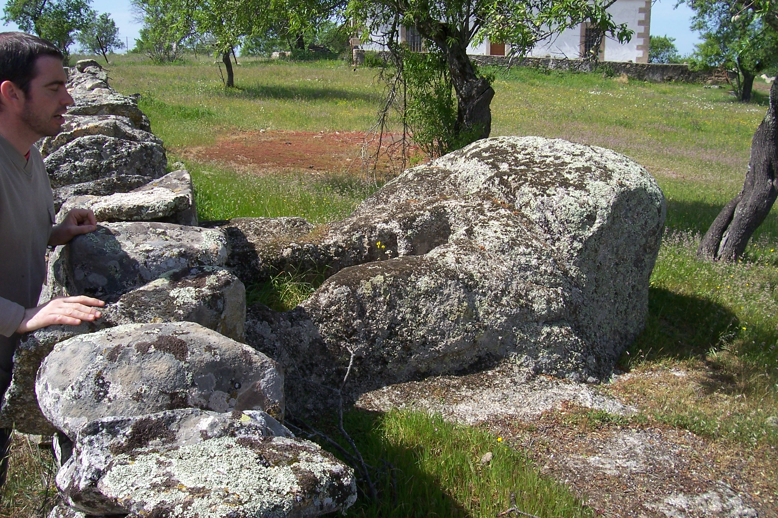 tumba excavada en piedra. posiblemente templaria